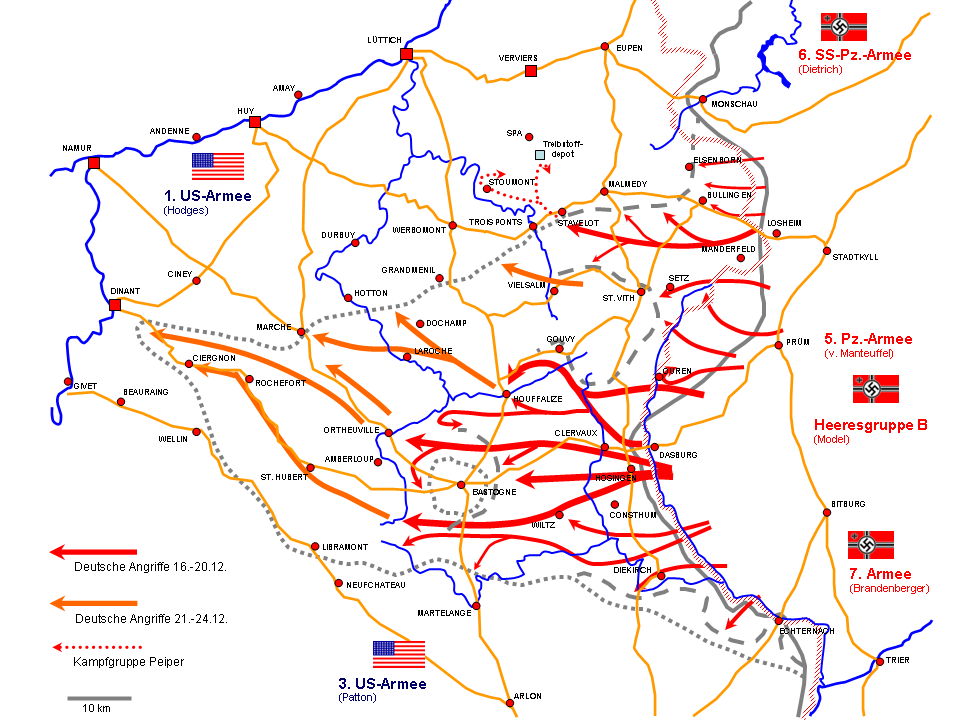 Karte der Ardennenoffensive 1944